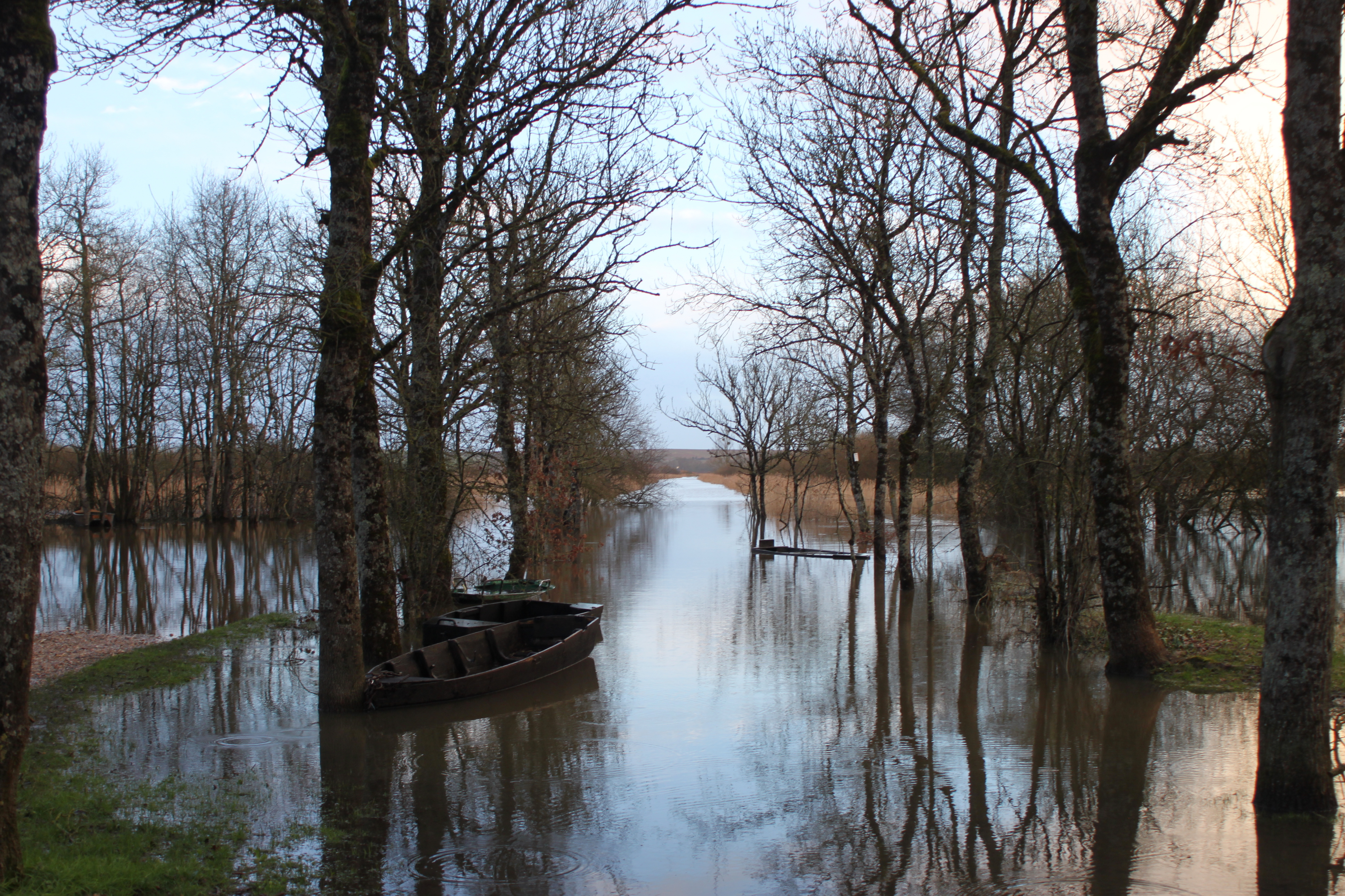 Le port du Montru noyé sous la crue (février 2014) du marais de Goulaine, Fr-44-la Chapelle-Heulin.